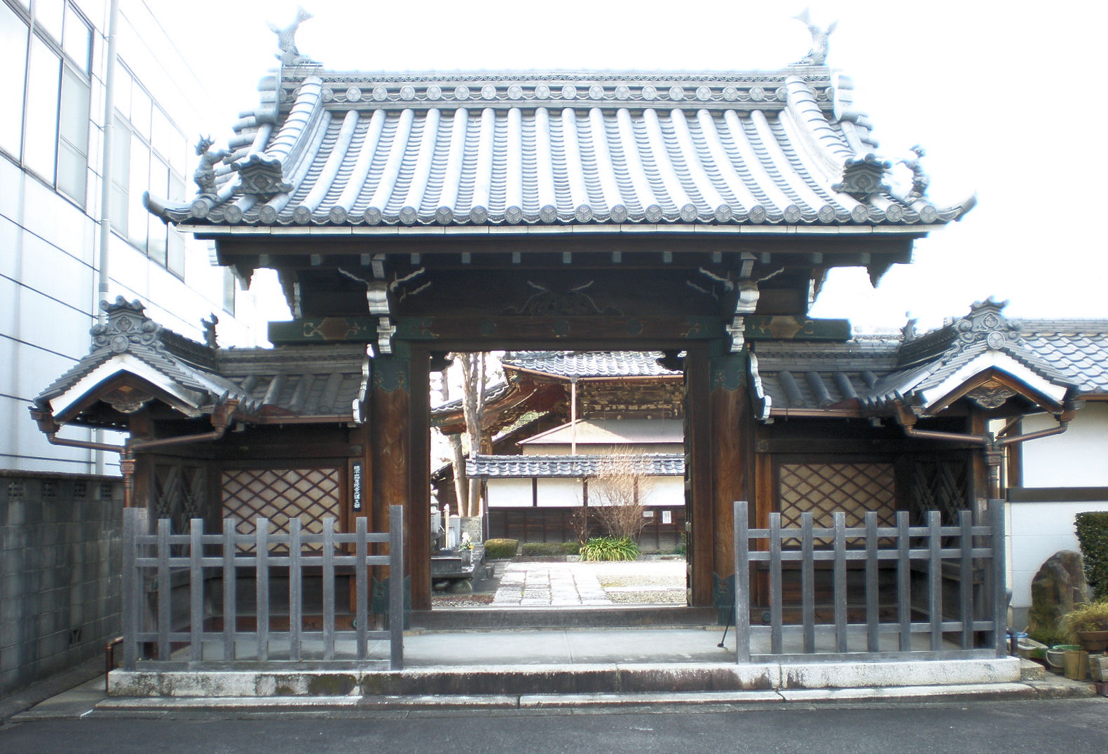 愛知県小牧市にある西林寺の山門